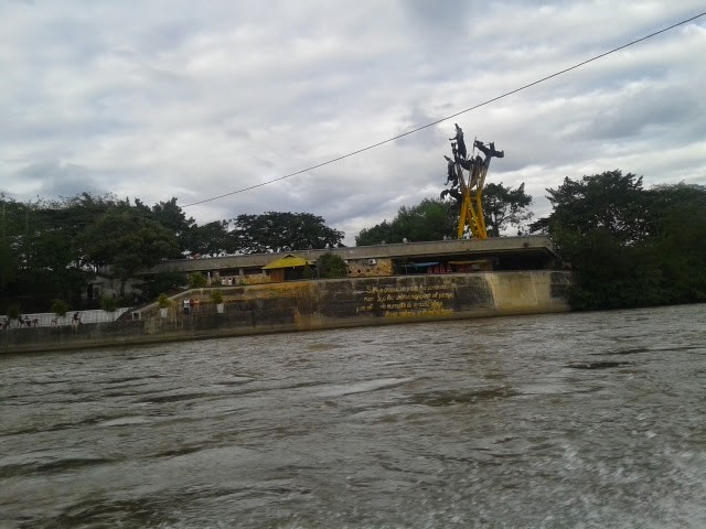 Monumento la Gaitana, rio Magdalena, Neiva, Huila. Esta fotografía fue tomada en el municipio colombiano con código 41001.